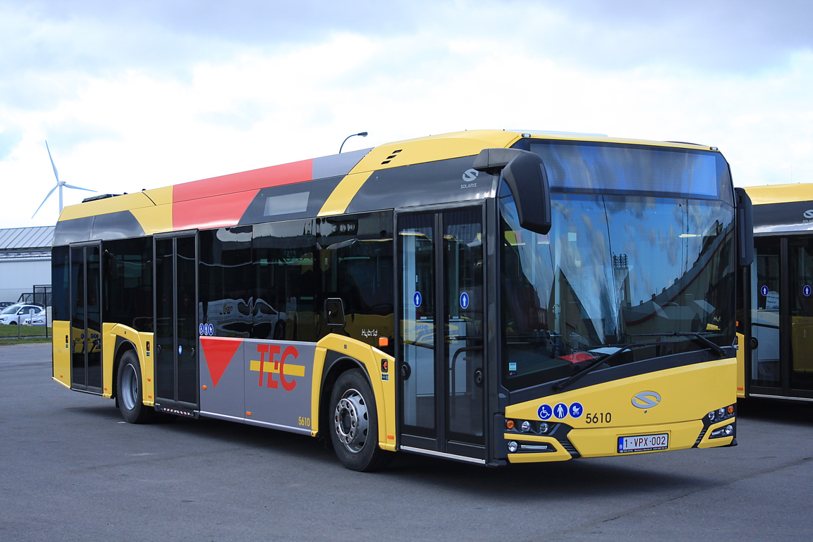 Autobus Solaris Urbino IV 12 hybrid n°5610 du TEC Liège-Verviers au garage Lens Car à Villers Le Bouillet.